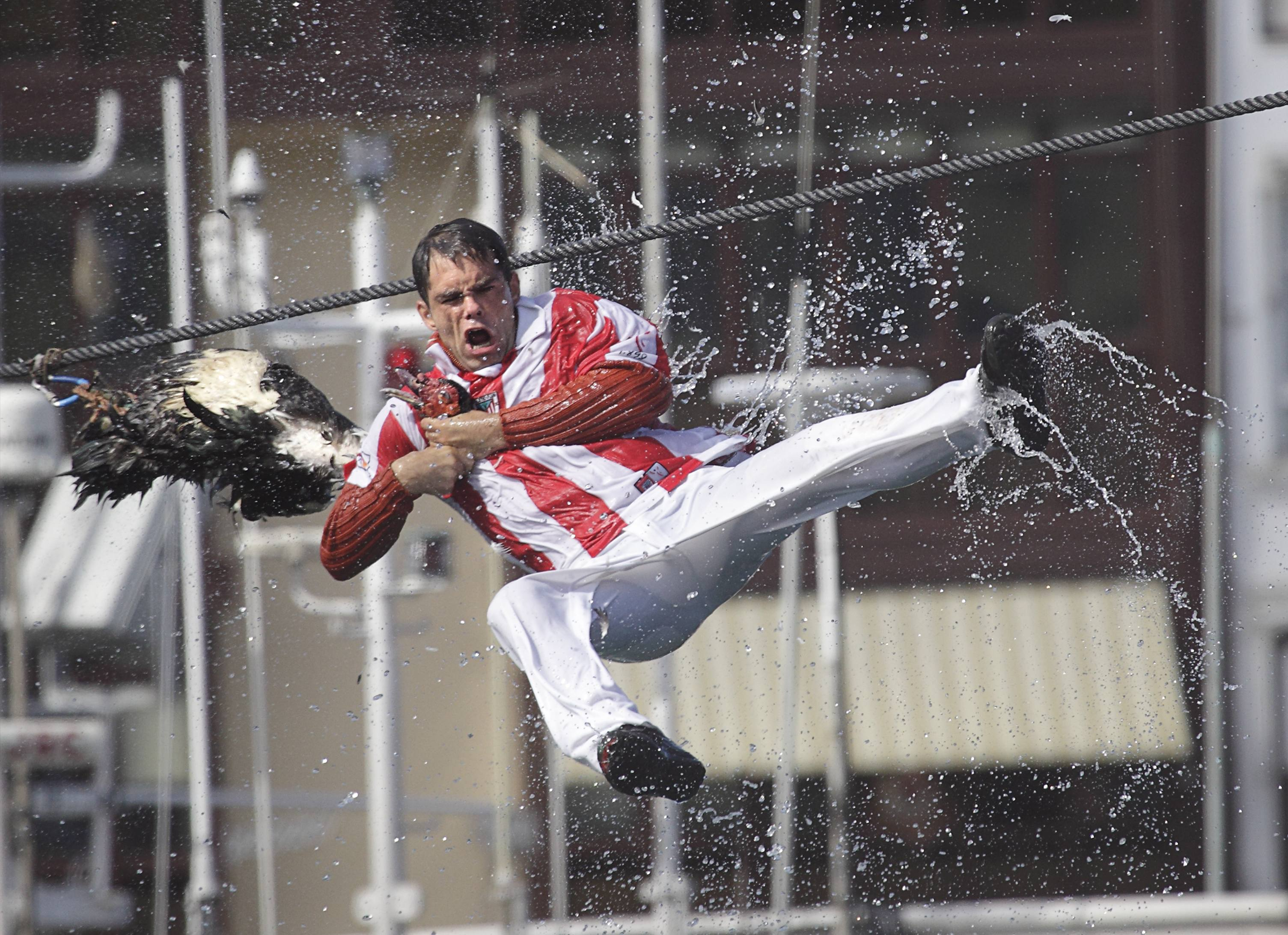 Antzara jokoan Lekeition, Antzar egunean, 2011eko irailak 5